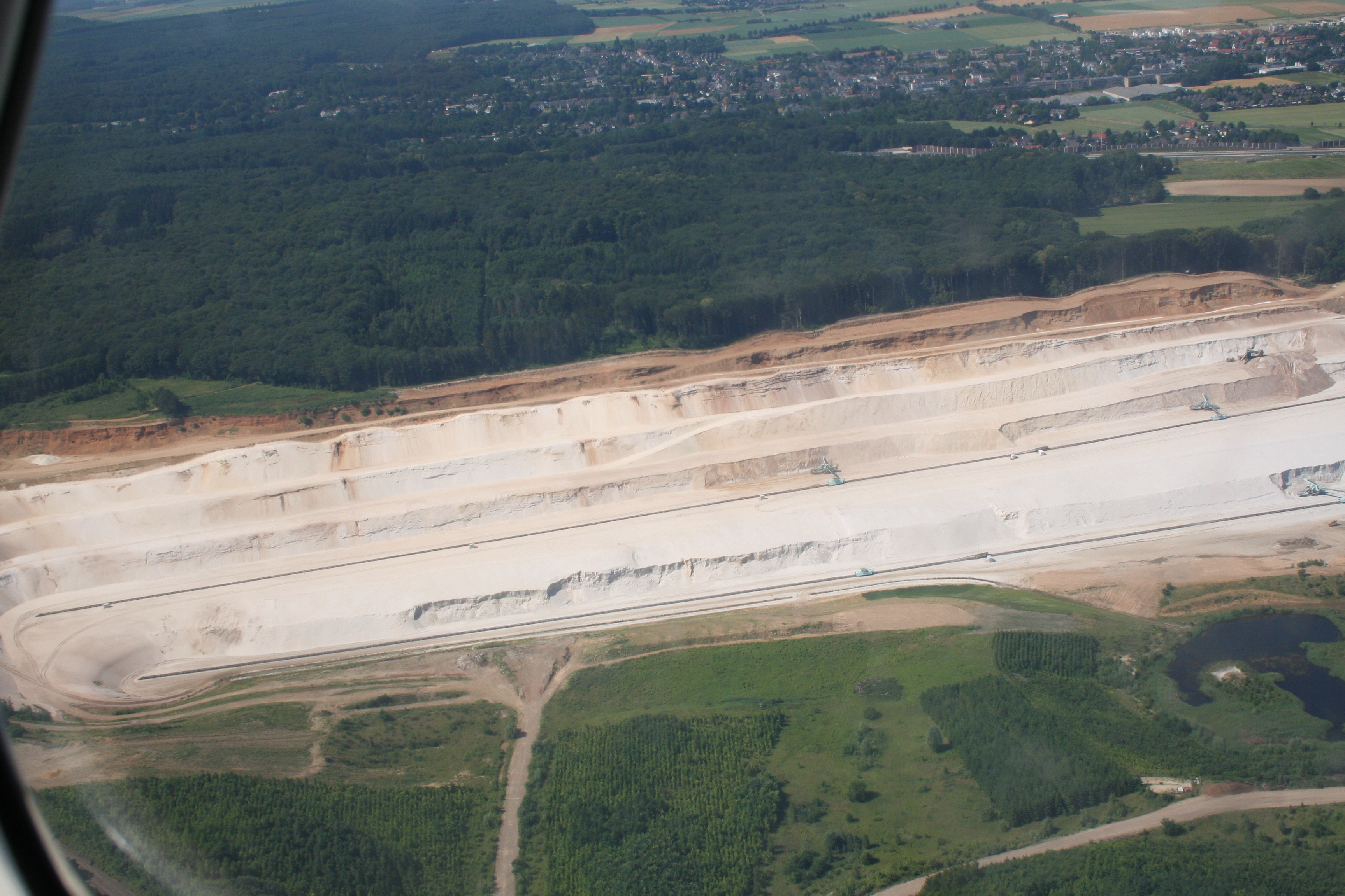 Quarzsand-Tagebau in Frechen